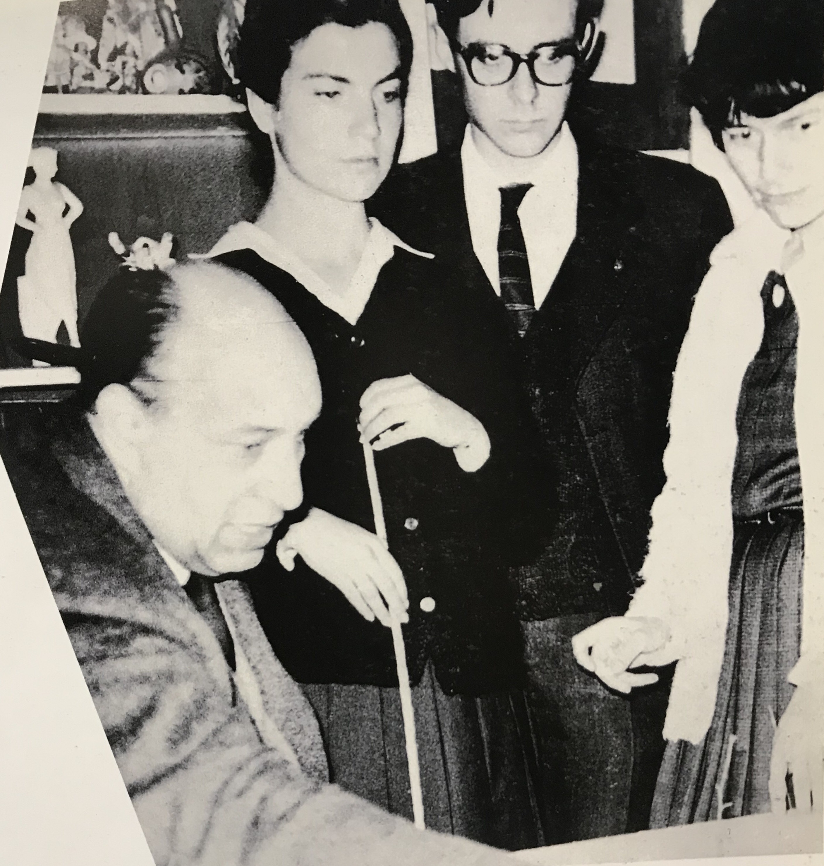 En orden de izquierda a derecha, Roberto Dávila, ::María Isabel Tuca García|María Isabel Tuca , Álvaro Guridi y Ester Chacón (1962)